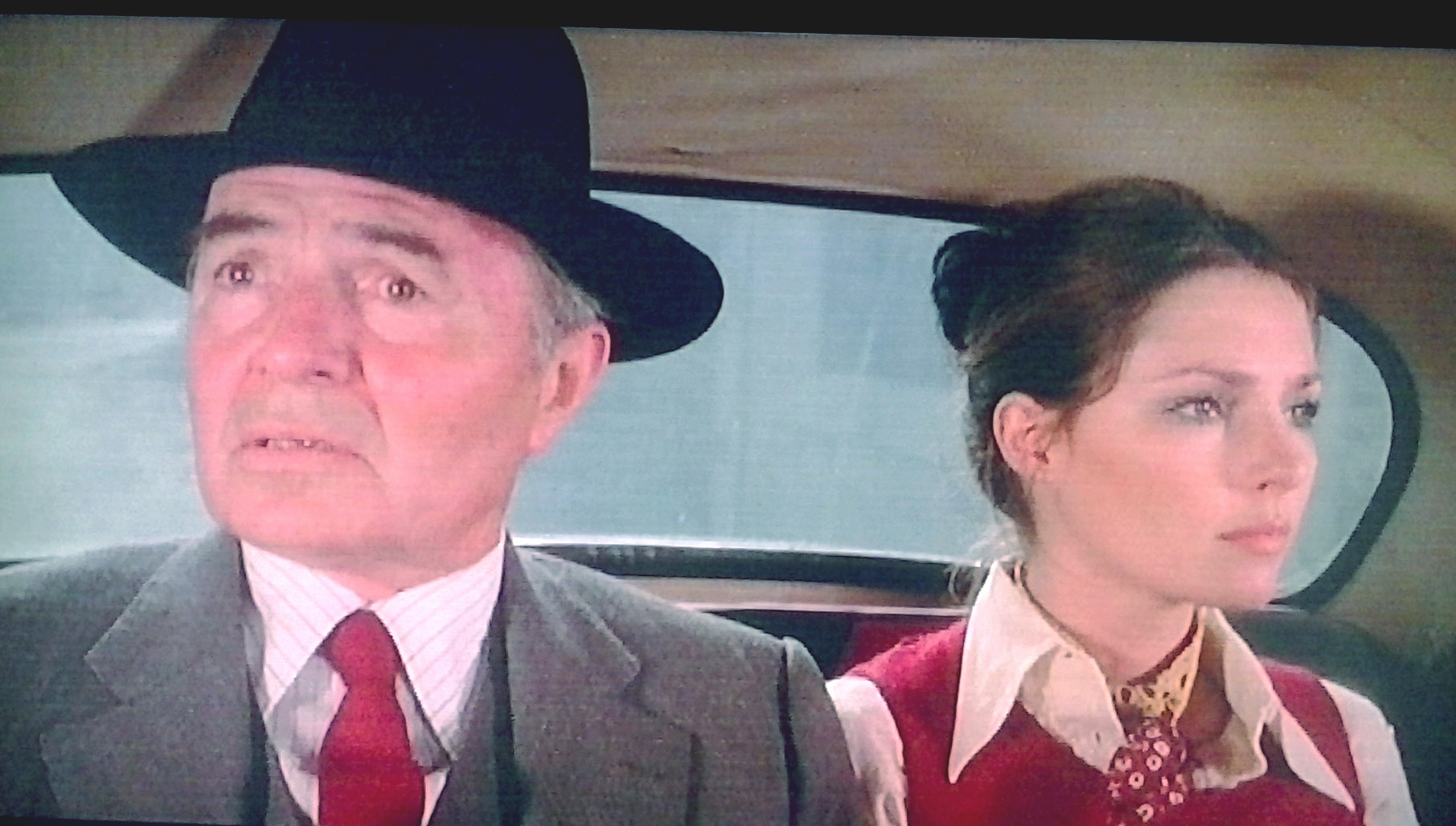 James Mason e Jennifer O'Neill in una inquadratura di "Gente di rispetto" (Zampa, 1975)